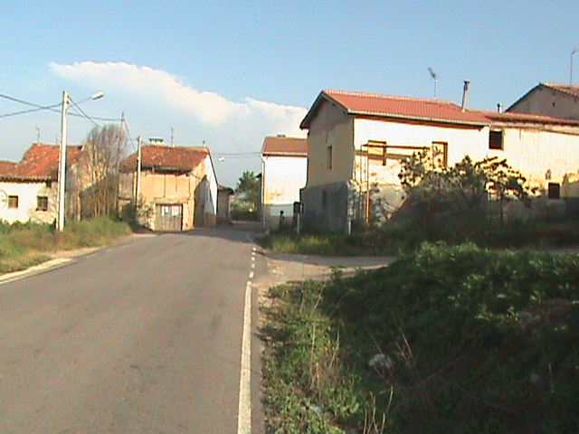 Entrando a Villalbos desde Villalmondar.